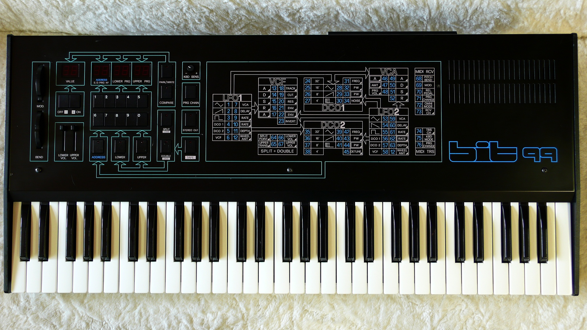 Crumar Bit 99 black